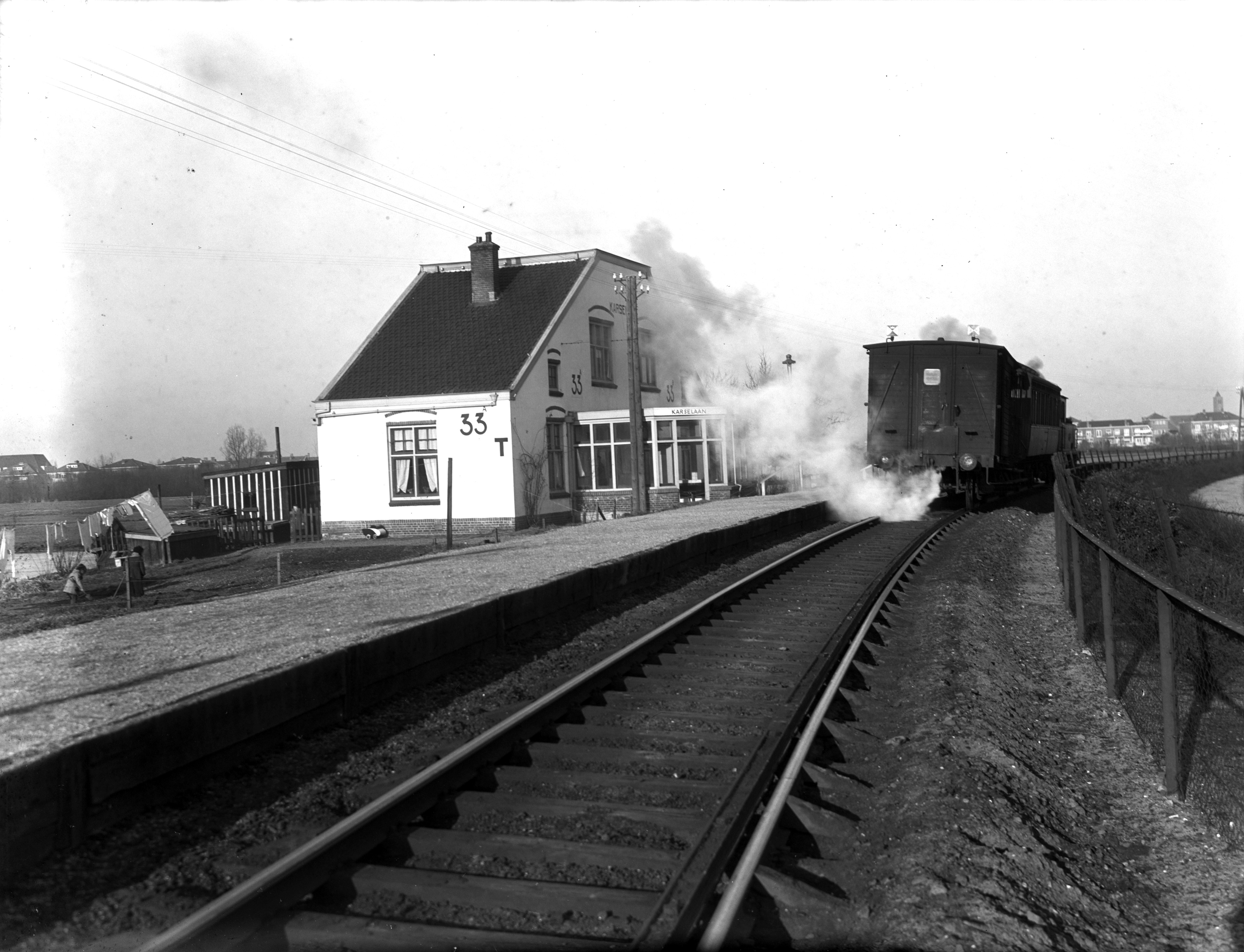 Gezicht op de perronzijde van het N.S.-station Karselaan te Amstelveen met de stoomtrein naar Amsterdam Haarlemmermeer in 1950.